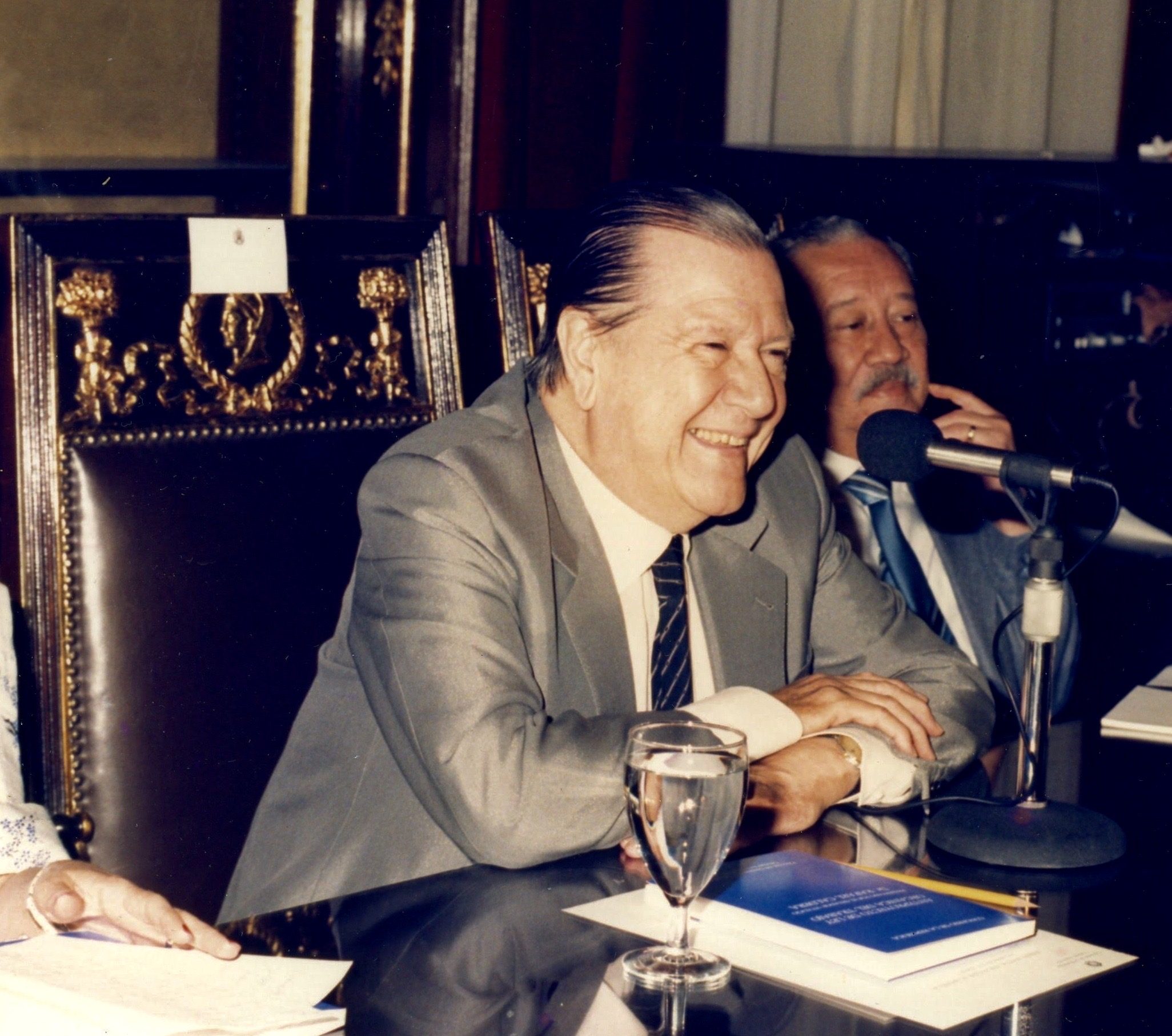 El senador vitalicio Rafael Caldera preside la Comisión Bicameral para la Reforma de la Ley del Trabajo.